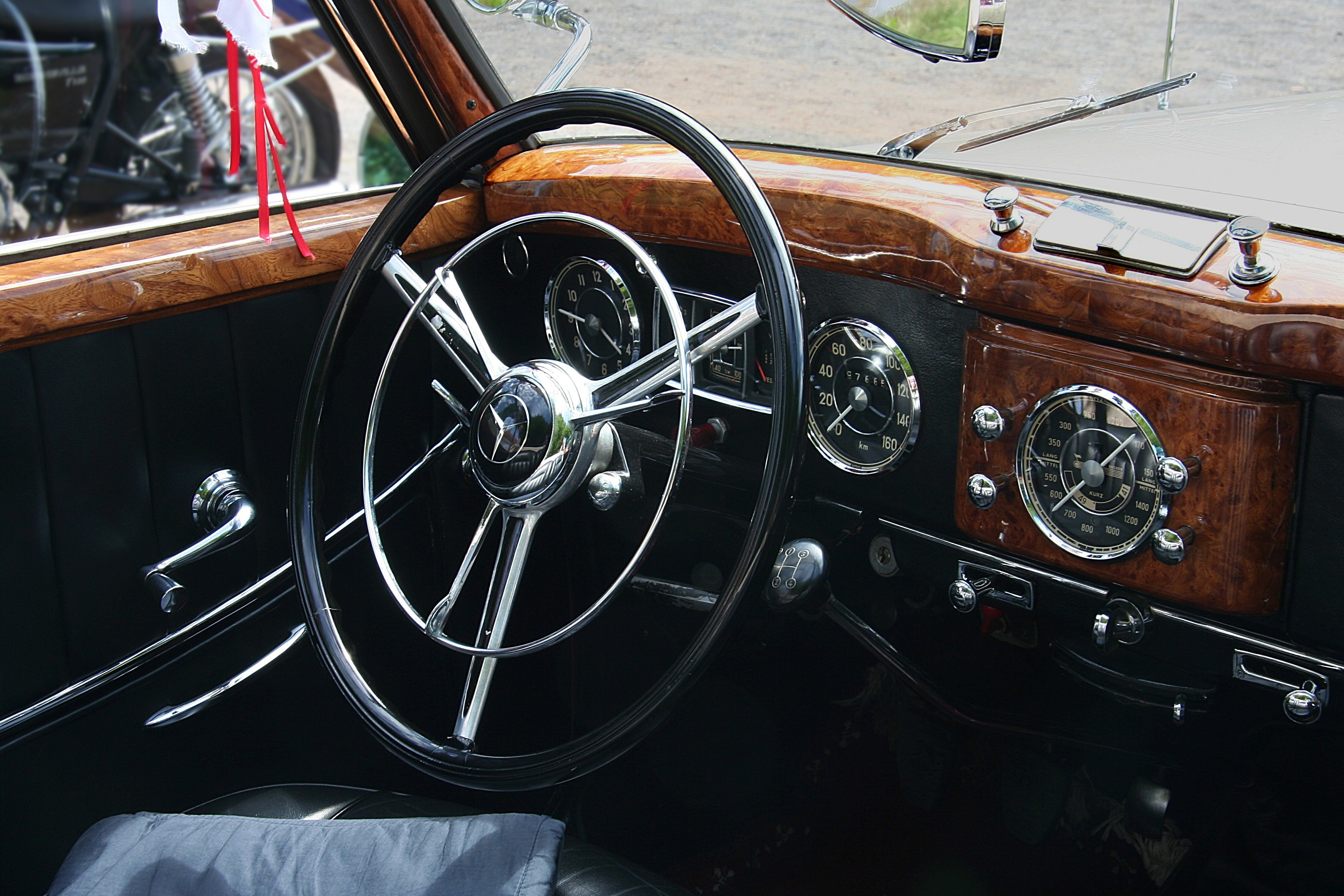 Armaturenbrett eines Mercedes-Benz 220 Cabriolet A, Hupring als Blinkerschalter, Typ W 187, Bauzeit 1951 bis 1955